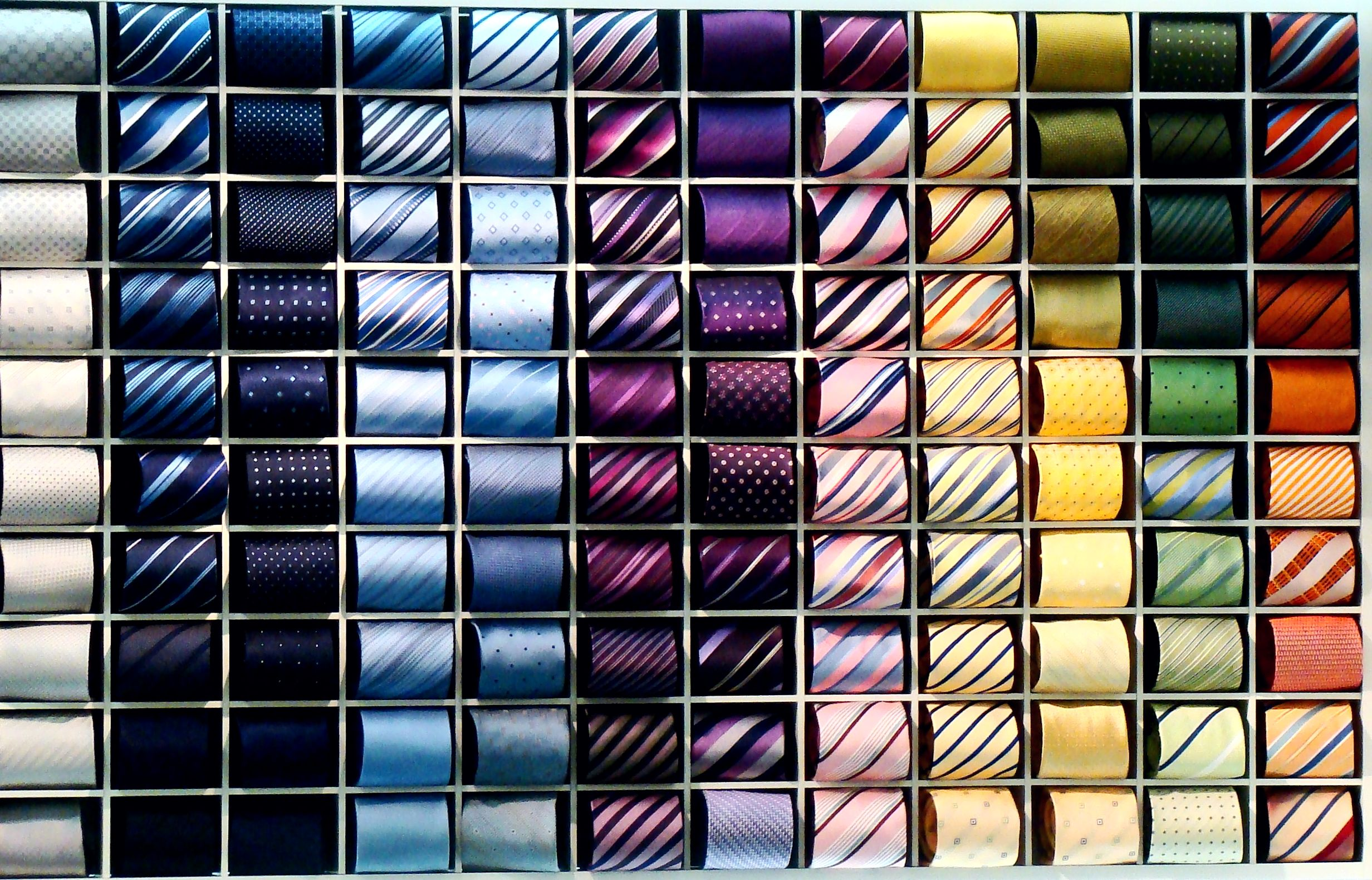 Tie collection